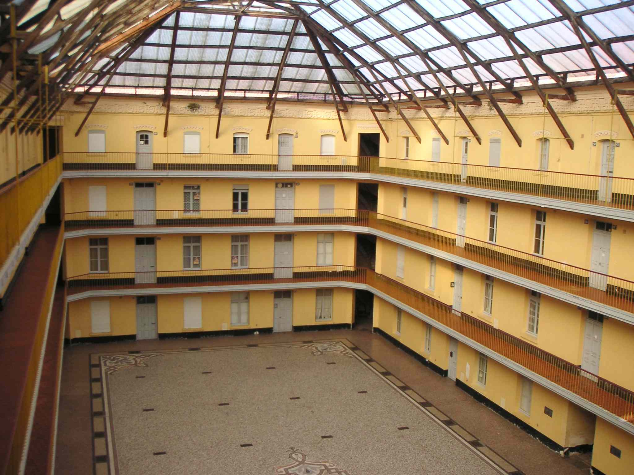 Photo de la salle intérieure du familistère central de guise prise par User:LonganimE le 03/sept/2005.